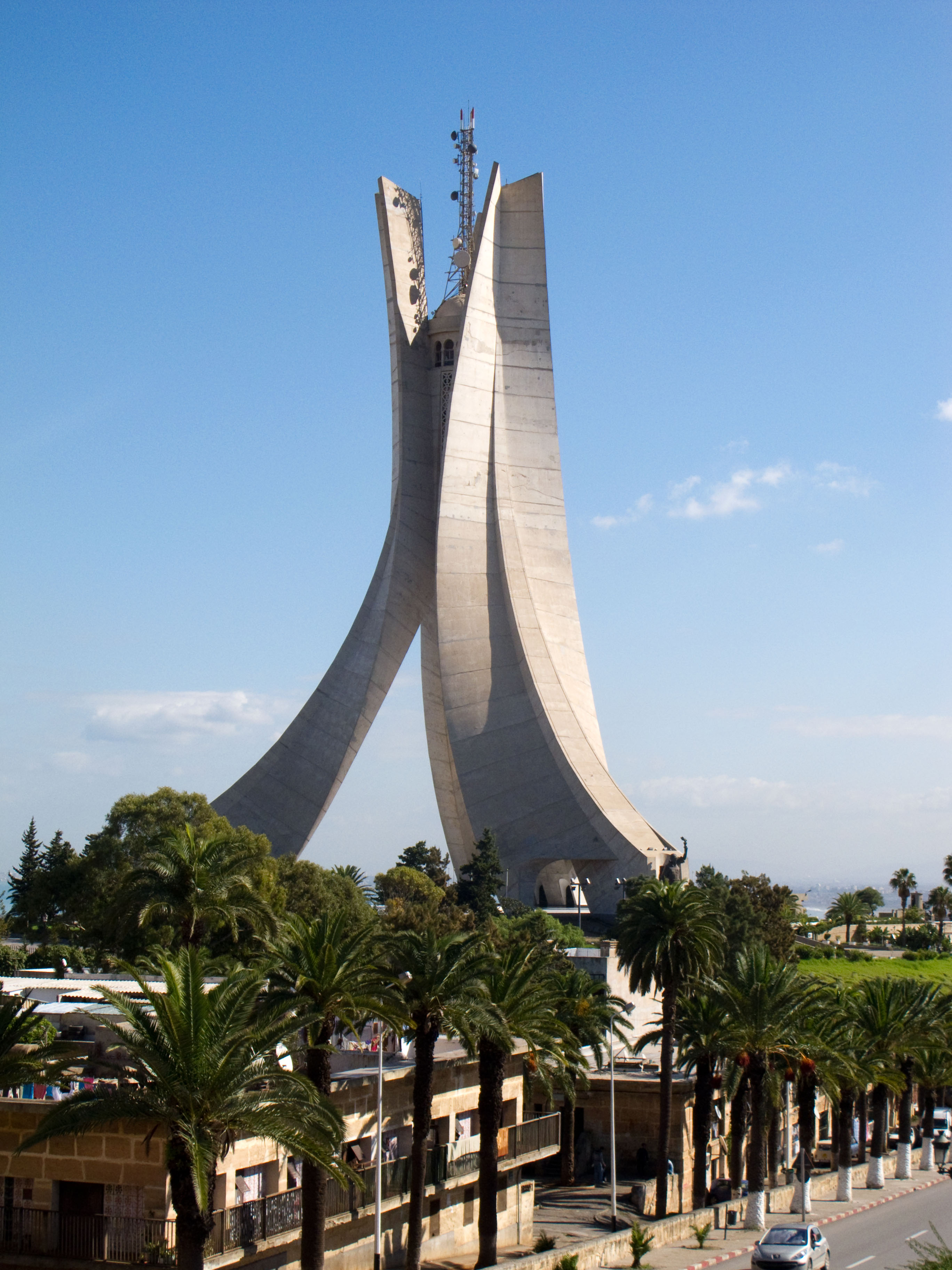 Mémorial du Martyr, Alger, Algérie